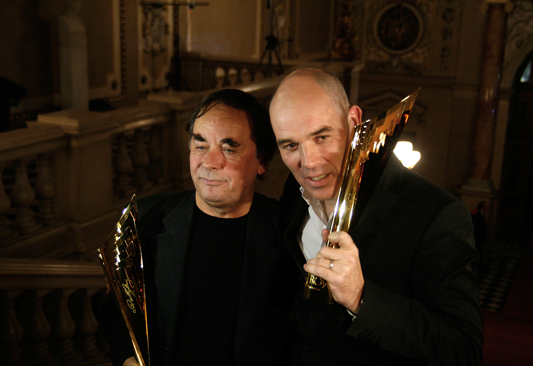 Johann Adam Oest, ausgezeichnet als bester Nebendarsteller, und Matthias Hartmann, ausgezeichnet mit dem Spezialpreis, bei der Verleihung des Nestroy-Theaterpreises 2010 im Burgtheater in Wien.